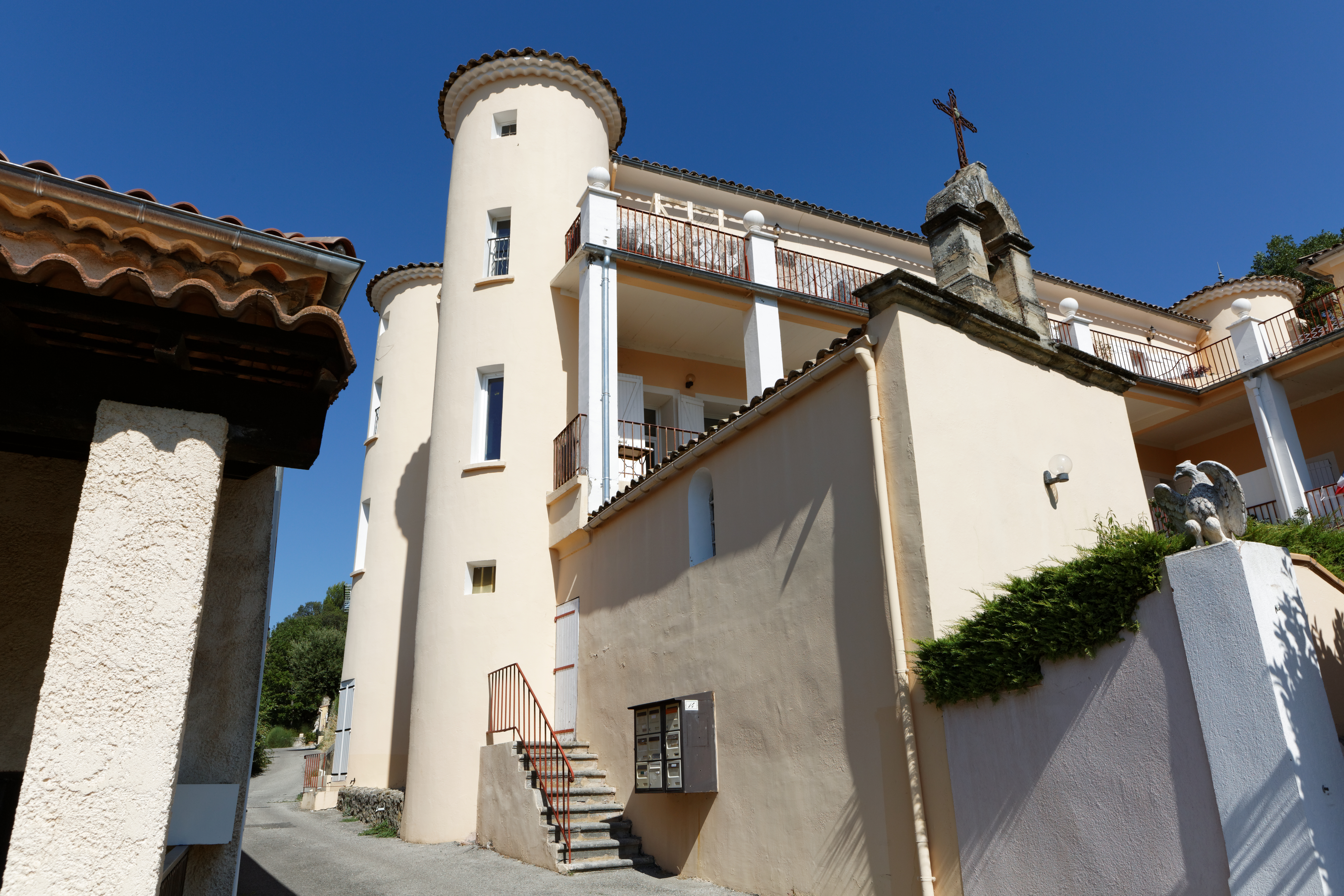 Opération Libre à Aiglun